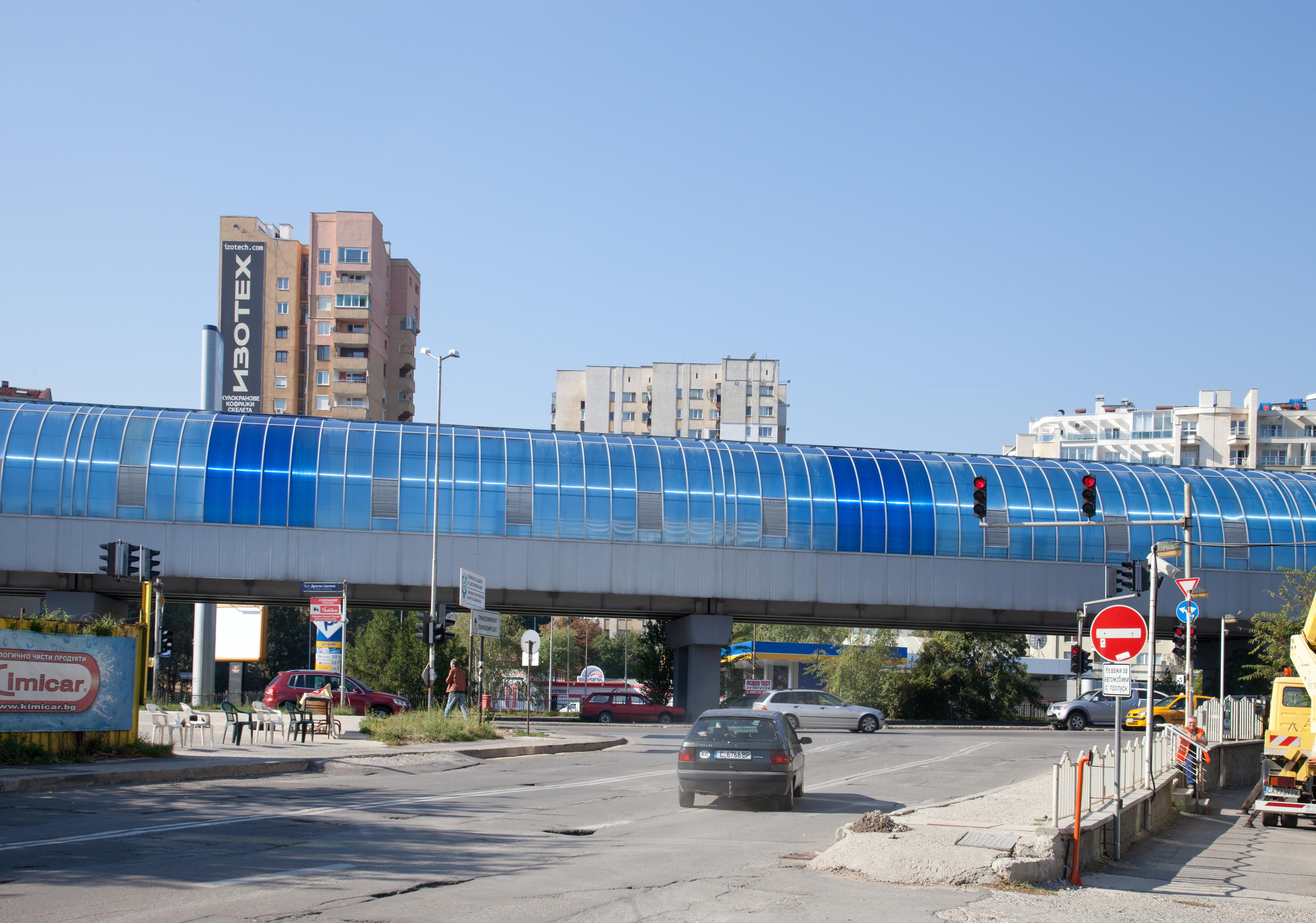 die Metro Sofia ist im gesamten oberirdischen Bereich im Norden Sofias mit einer leichten Konstruktion überdacht; hier am Bulevard Dragan Zankov; die Fahrgäste können dadurch nichts außerhalb des Tunnel erkennen